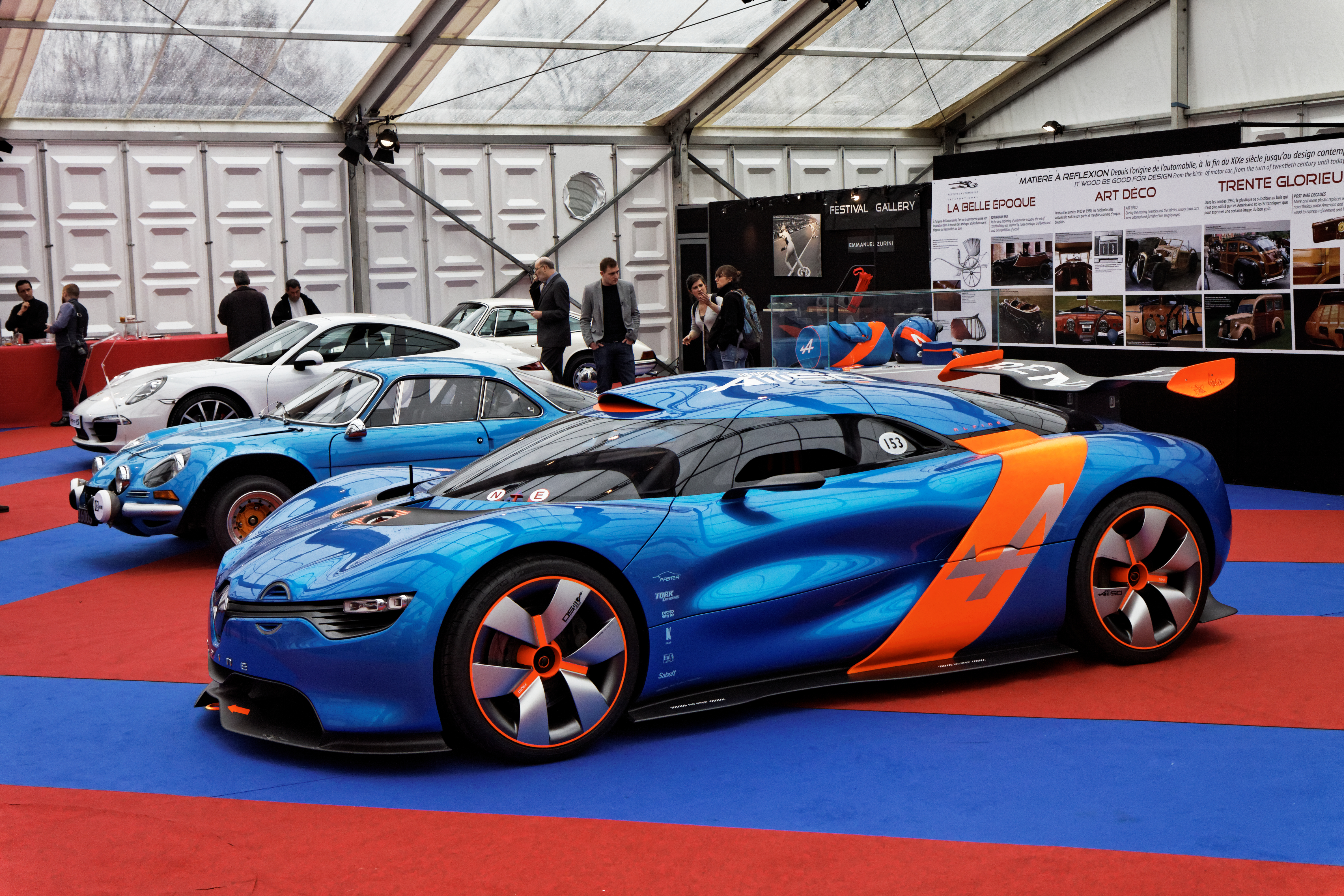 Une Renault Alpine A110 50 Concept exposée lors du festival automobile international 2013.